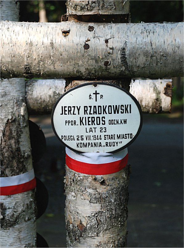 Nad grobem Jerzego Rządkowskiego na Powązkach Wojskowych w Warszawie